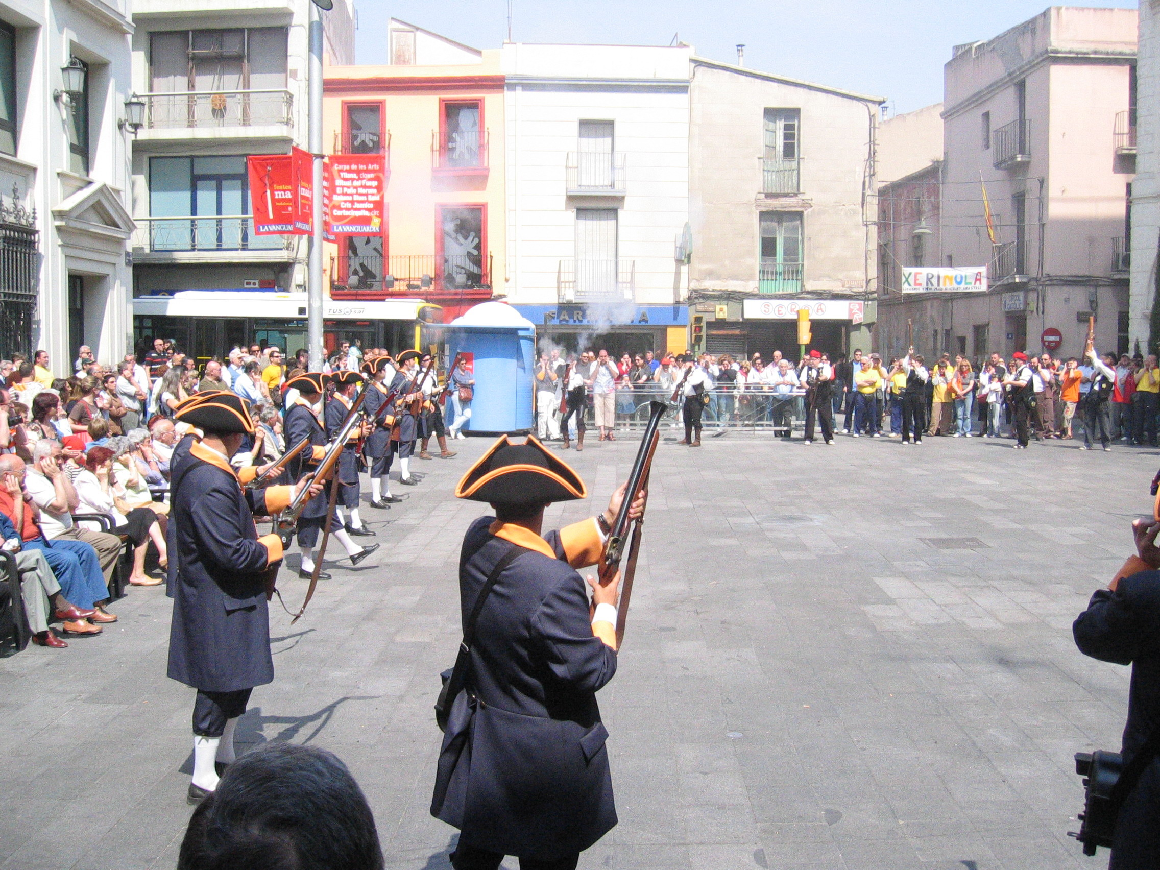 Descàrrega a la Plaça de la Vila per les Festes de Maig del 2006